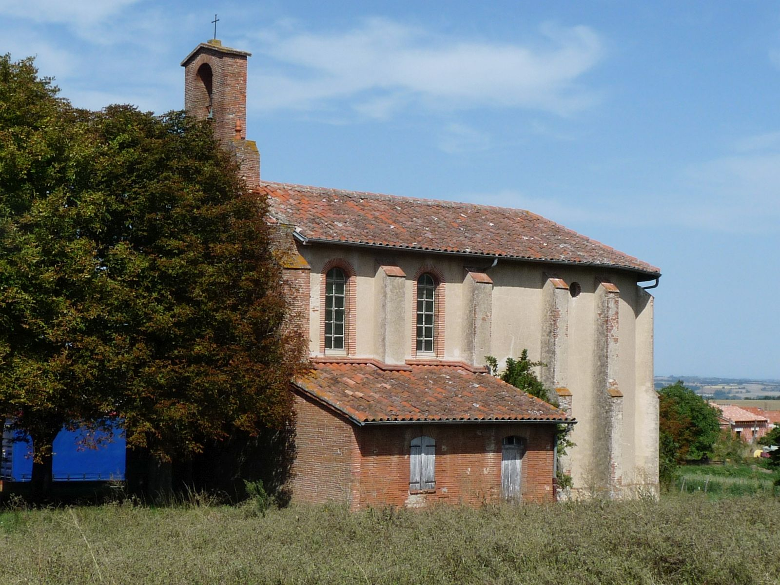 Eglise de Belbèze-de-Lauragais, Haute-Garonne, France